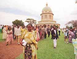 Bahá'í Haus der Andacht in Uganda